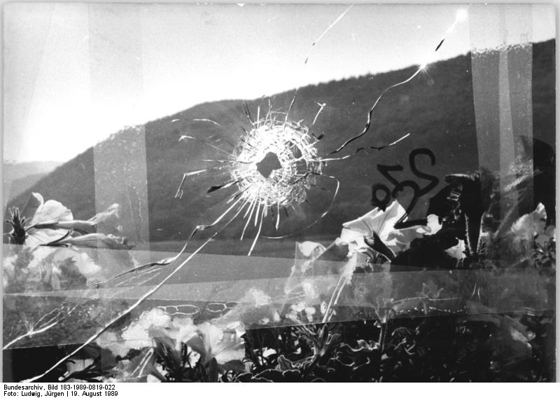 ADN-ZB-Ludwig-19.8.89-mx-Bez. Erfurt: Grenzprovokation - In den Nachtstunden vom 17. zum 18. August beschossen zwei männliche Personen vom Gebiet der BRD aus Grenzsicherungsanlagen, Wohngebäude sowie die Kirche der unmittelbar an der Staatsgrenze der DDR liegenden Ortschaft Wahlhausen, Kreis Heiligenstadt. Einer der fünfzig abgefeuerten Schüsse traf das Wohnzimmerfenster der Familie Feige.